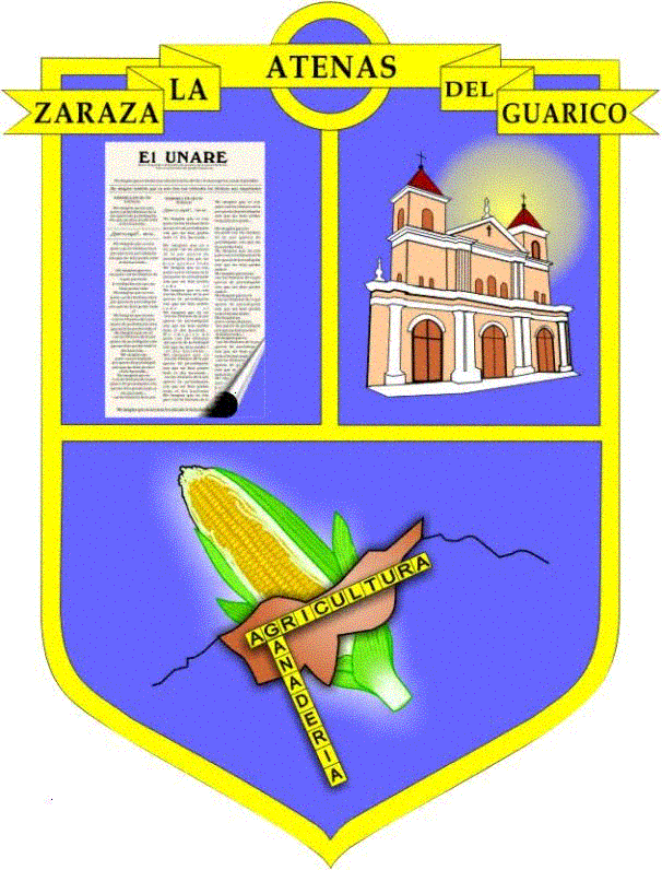 Escudo de Zaraza